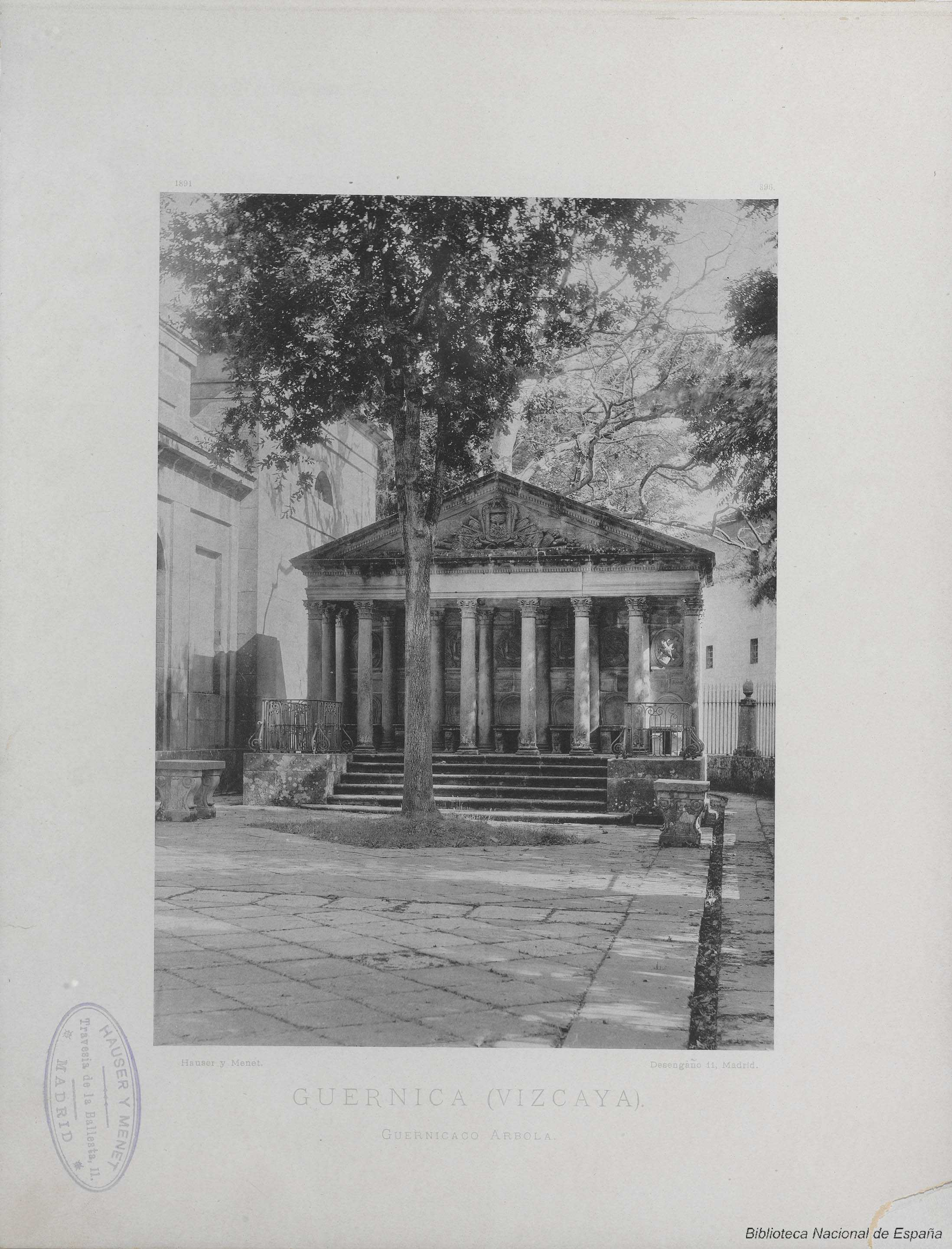 Guernica, Guernicaco Arbola ; Hauser y Menet Autor: Hauser y Menet (Madrid) Fecha: 1891 Datos de edición: Madrid, Hauser y Menet